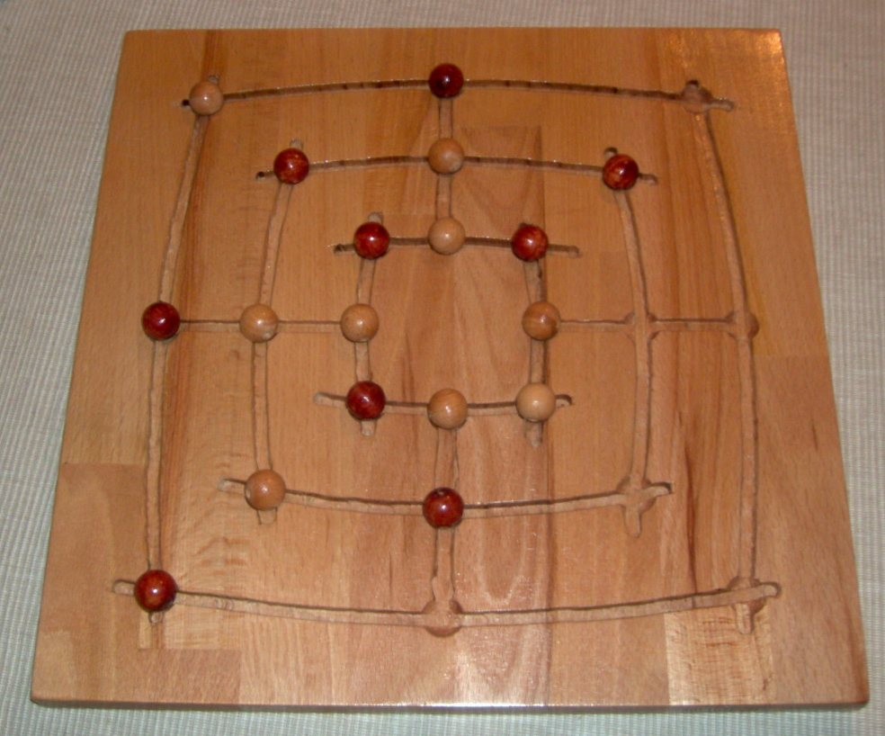 Mühlespiel